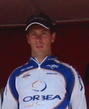 Beñat Albizuri, Orbea team, Euskal Bizikleta 2005